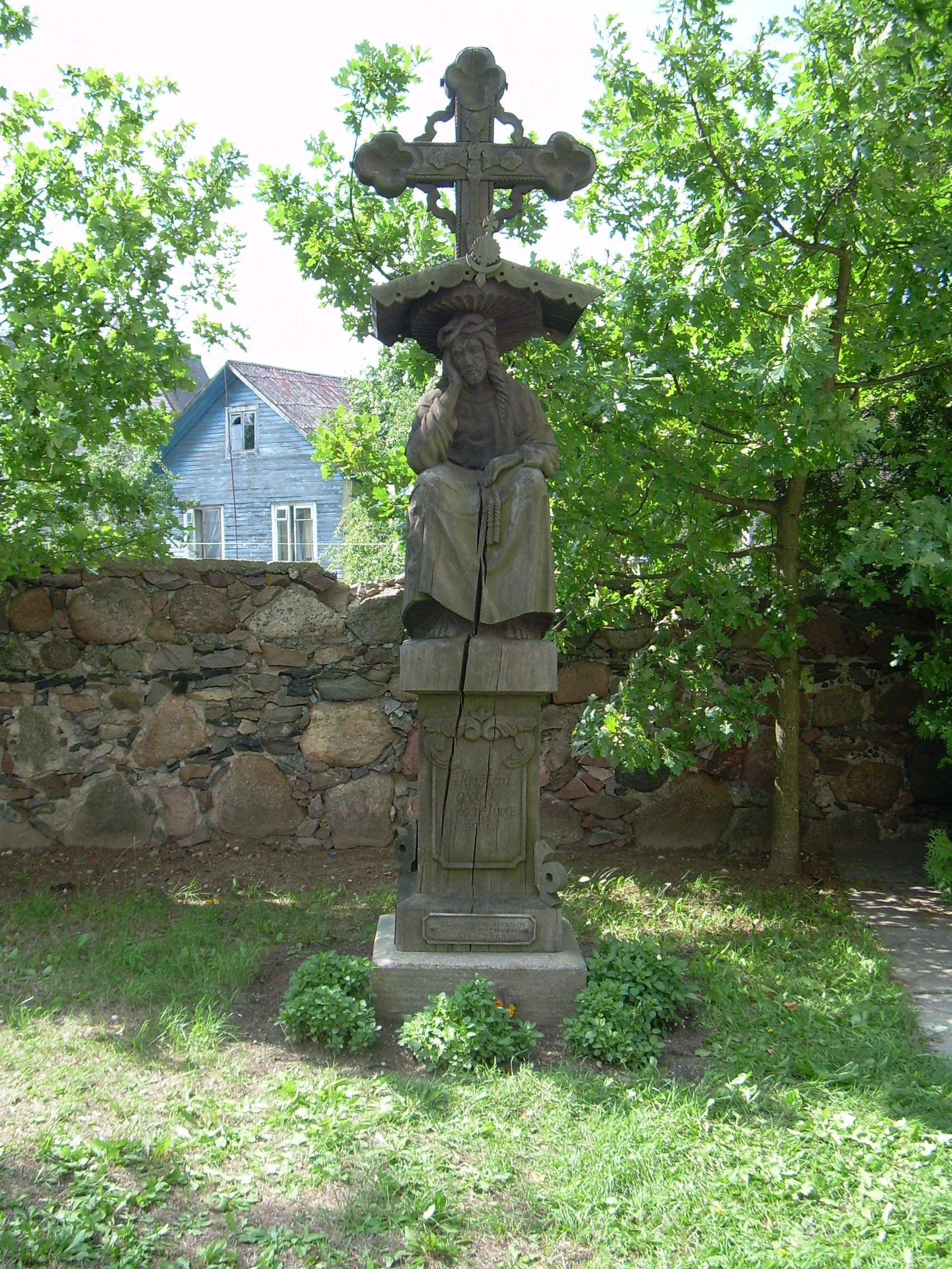 Šeduvos Šv. Kryžiaus Atradimo bažnyčia